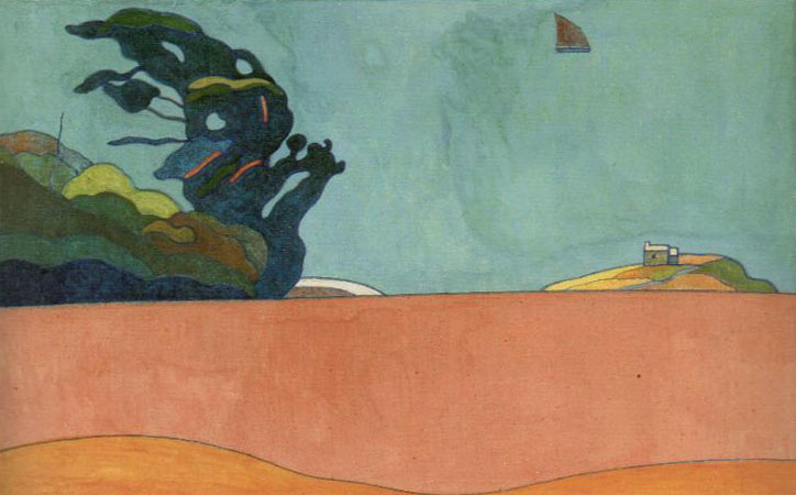 Paysage du Pouldu, painting by French artist Charles Filiger, gouache on paper, Musée des Beaux-Arts de Quimper